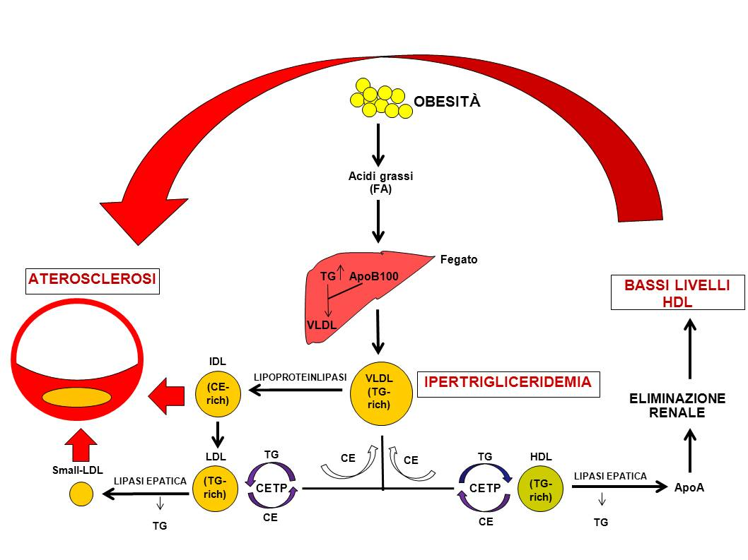 Schema della dislipidemia nella sindrome metabolica.